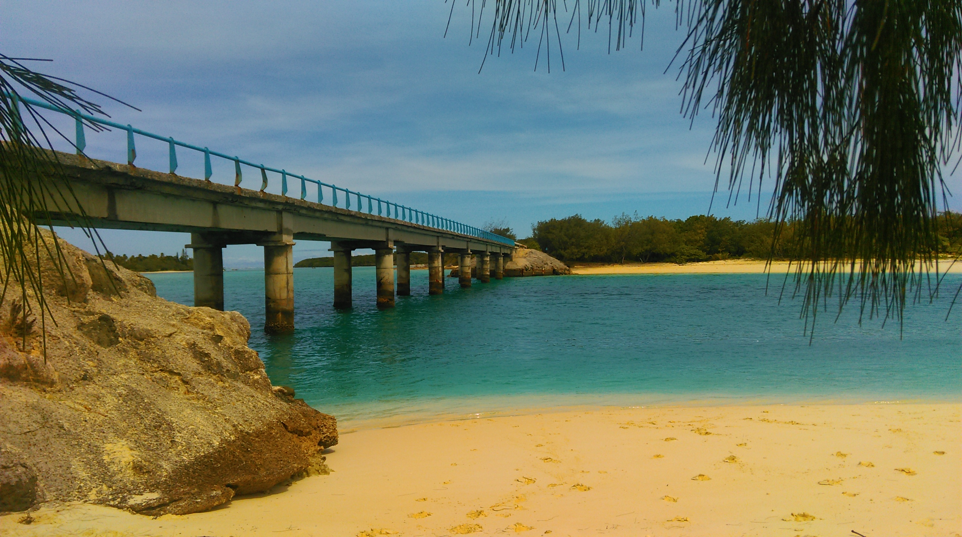 image : Florent Foissac